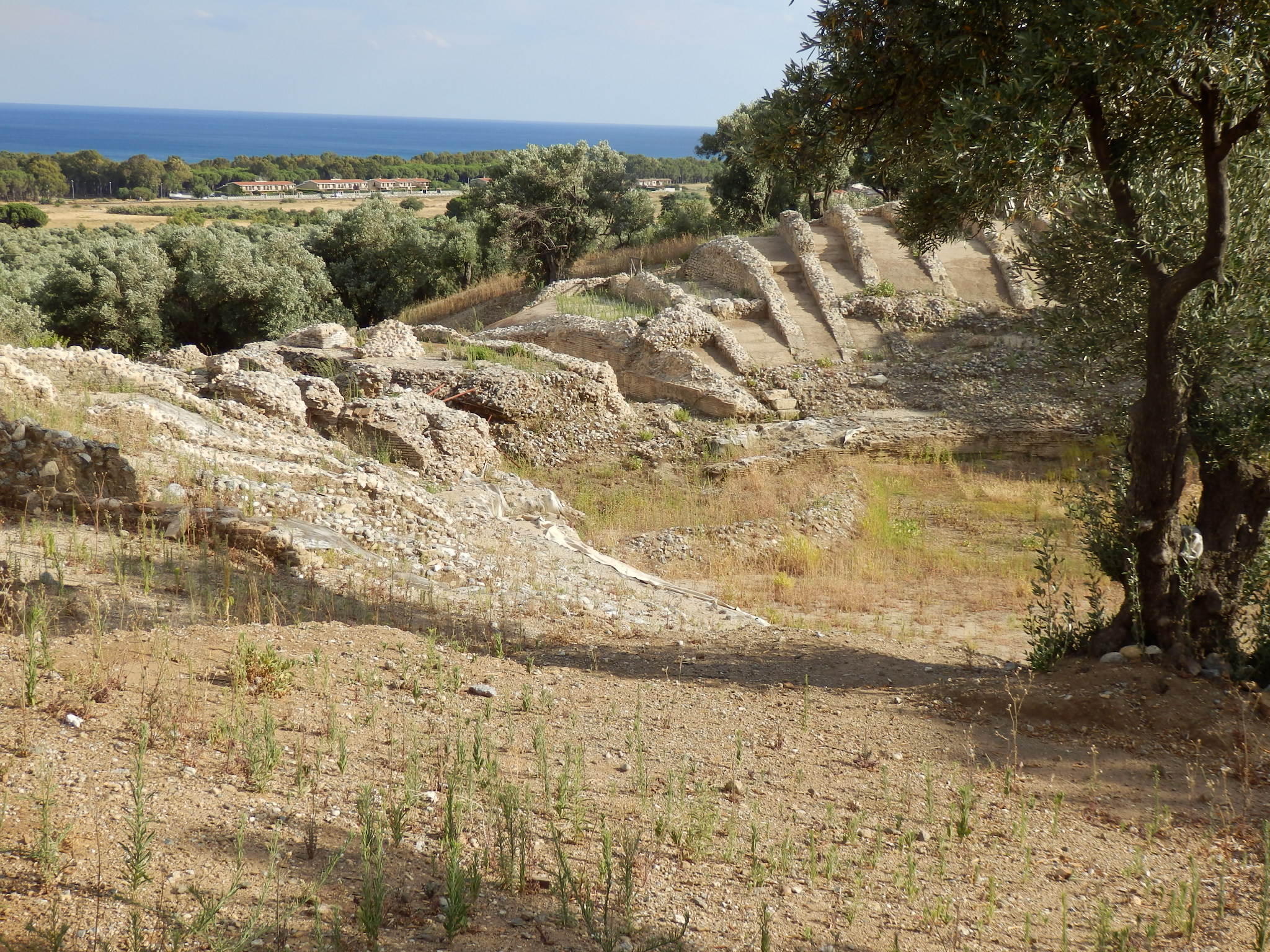 Vue de l’amphithéâtre romain de Scolacium.